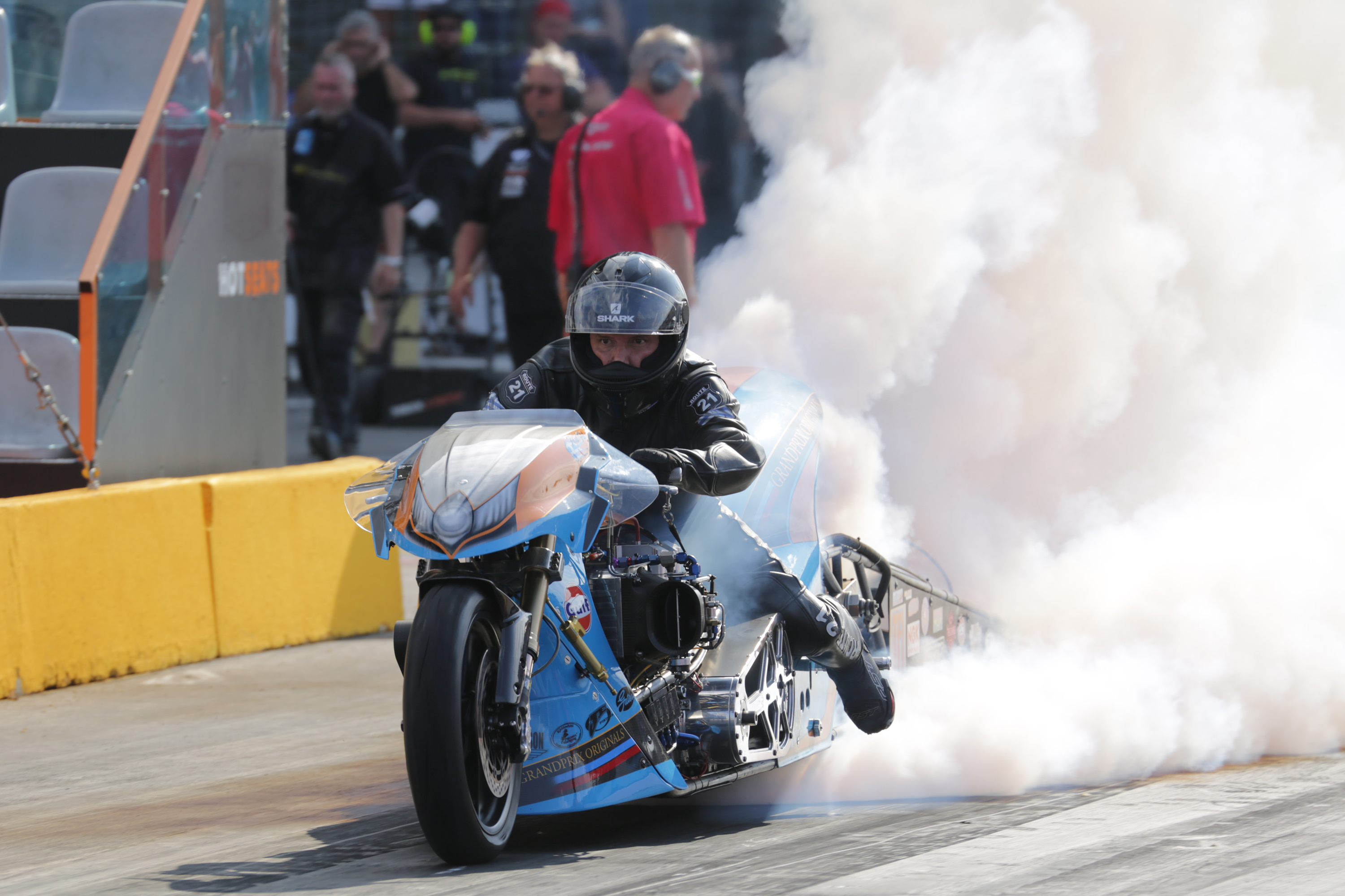 FIM Top Fuel Bike Filippos Papafilippou (GRE) Nitrolympx 2019 / Burnout